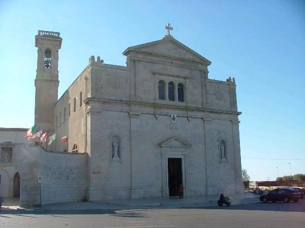 Facciata della chiesa della Madonna dei Martiri a Molfetta